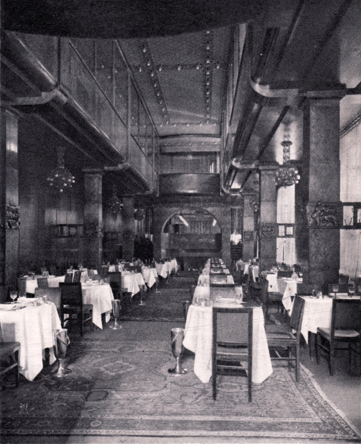 Berlin - Weinhaus Rheingold, Ansicht des Galeriesaals